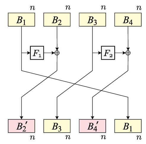 רשת פייסטל כללית מסוג 2